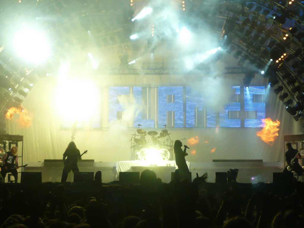 In Flames